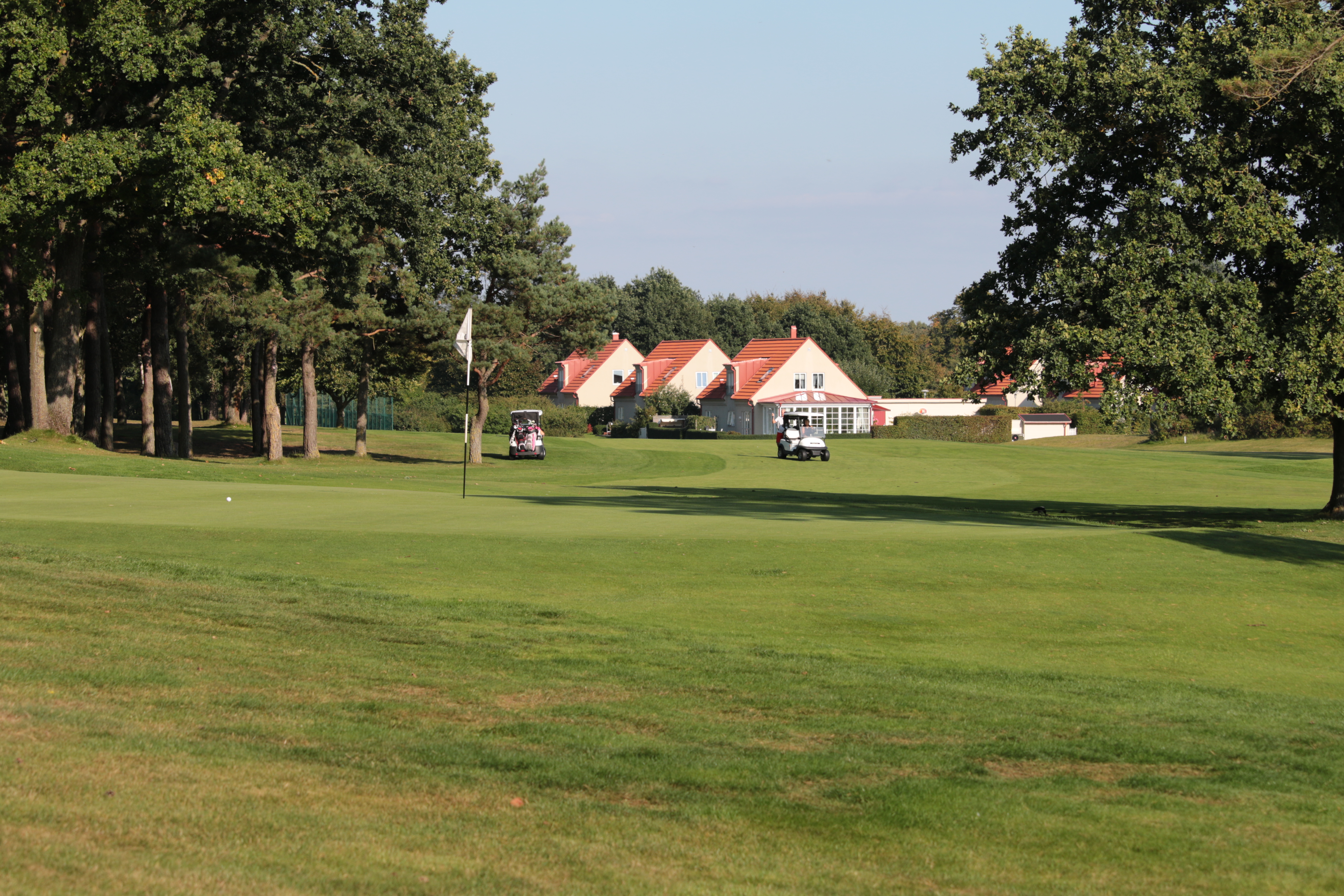 Barsebäcks golfklubb